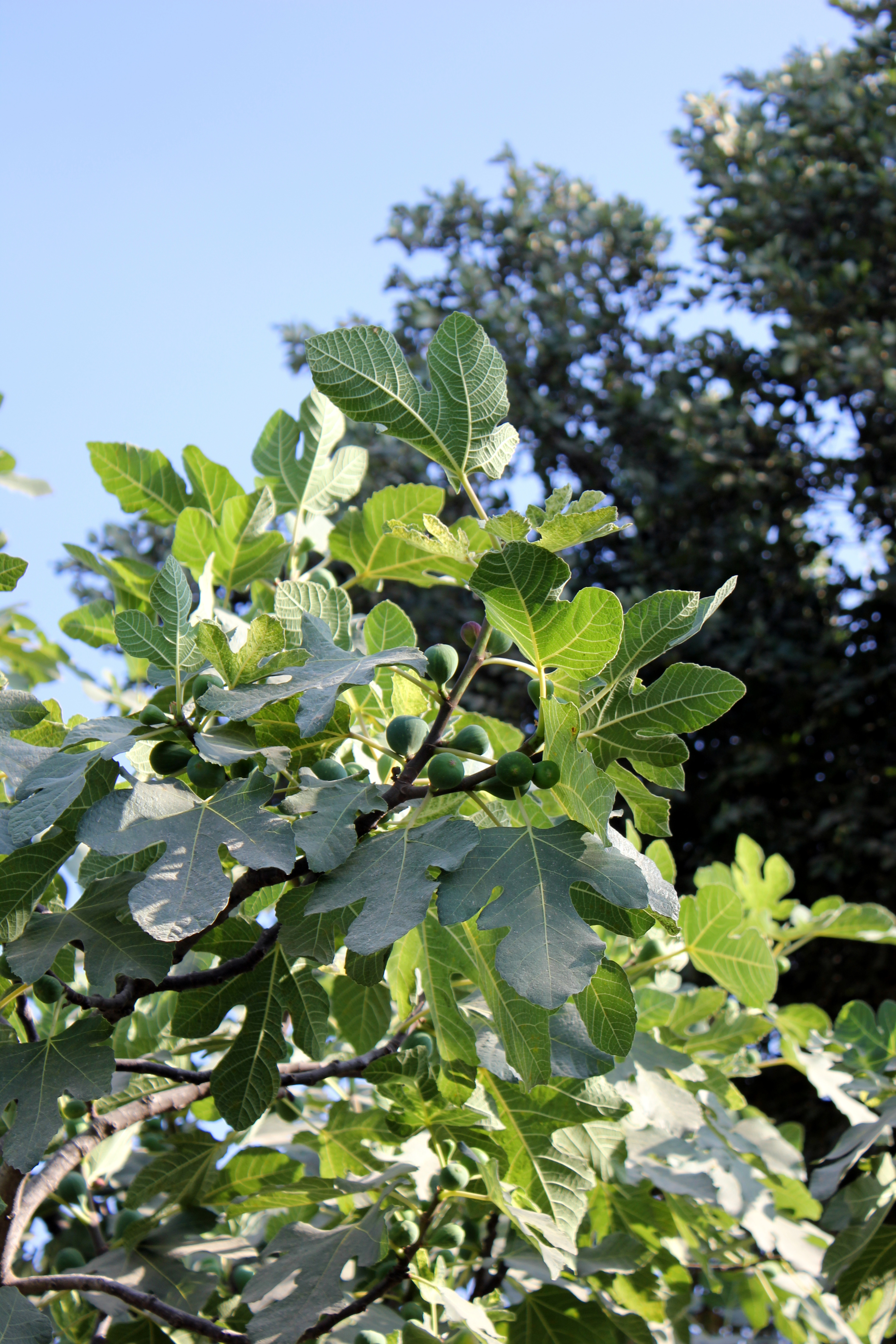 Ficus carica in Israel